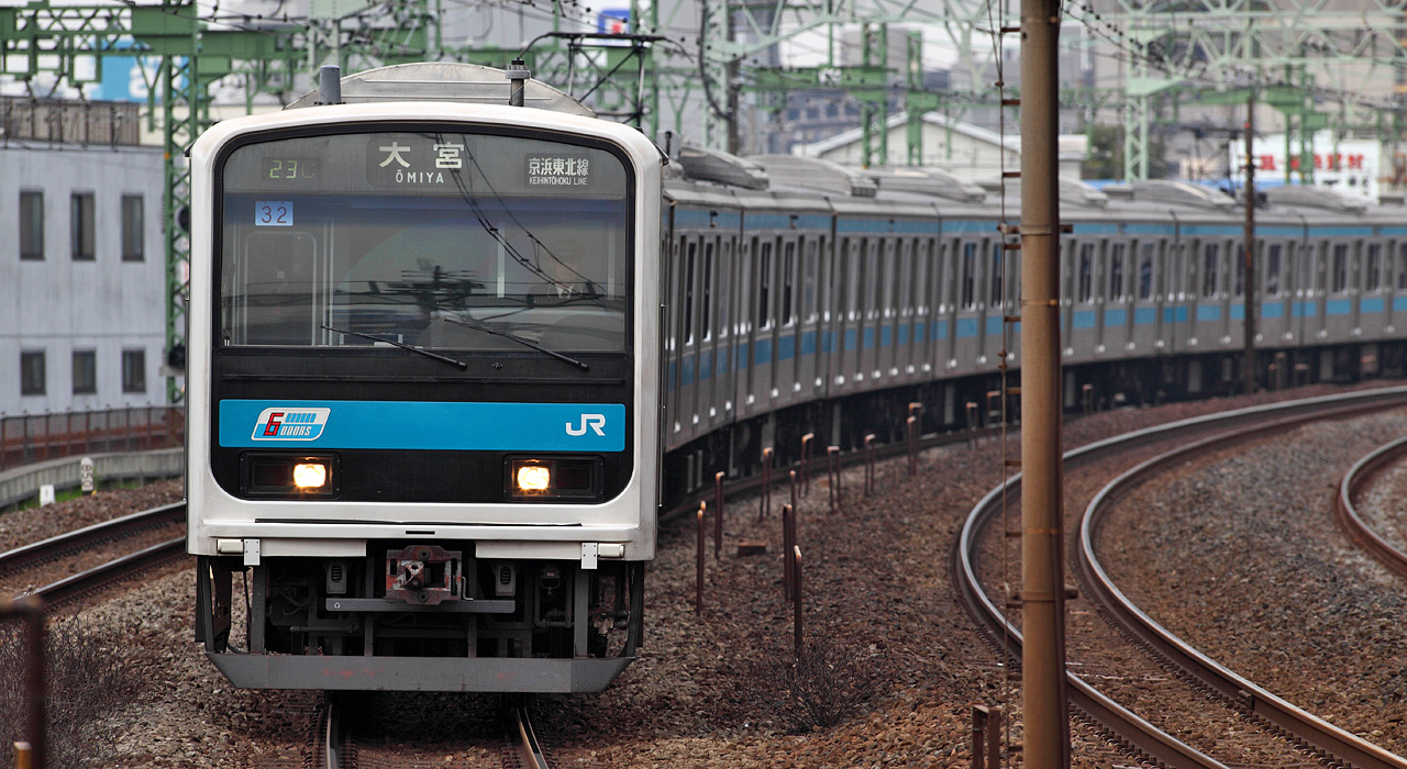 JR East 209 series EMU on Keihin-Tōhoku Line ( 32F / Higashi-Kanagawa Sta. ~ Shin-Koyasu Sta. ).